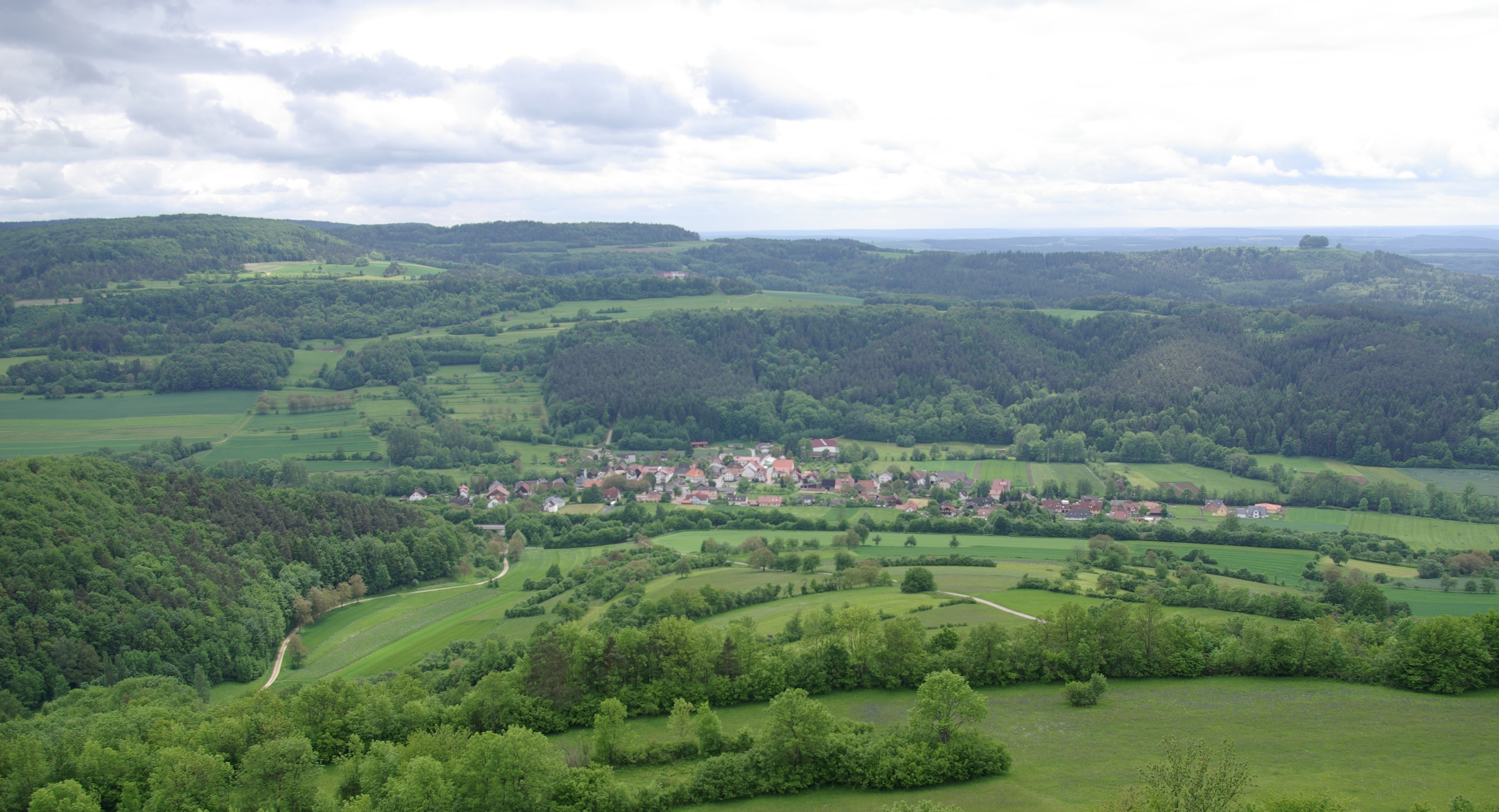 Blick vom Staffelberg auf den Bad Staffelsteiner Ortsteil Loffeld